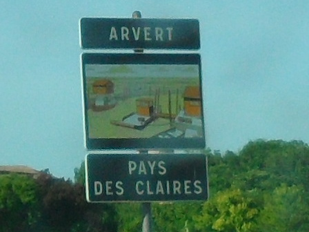 Arvert